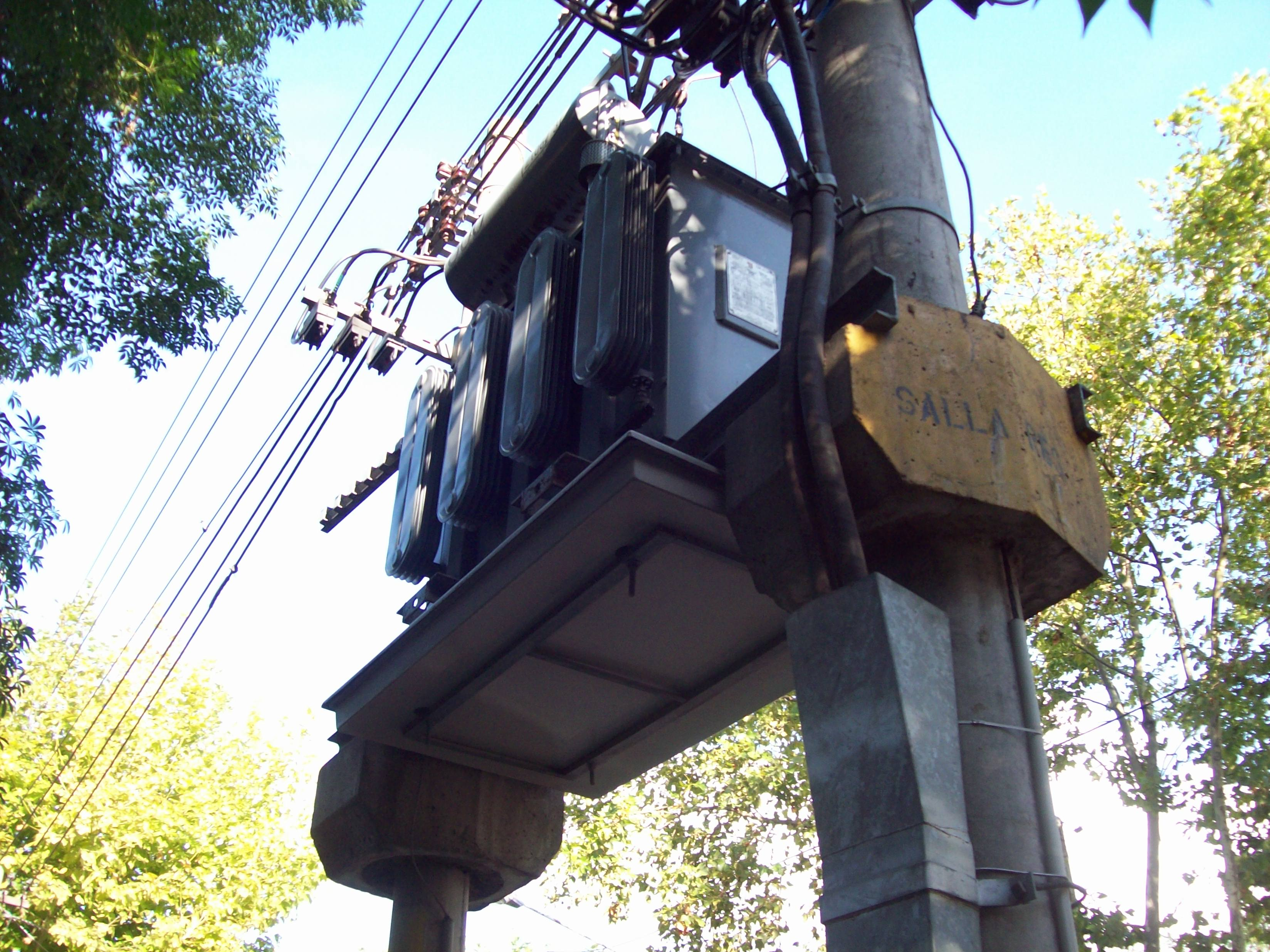 Es una foto de un transformador de calle con el refrigerante PCV.